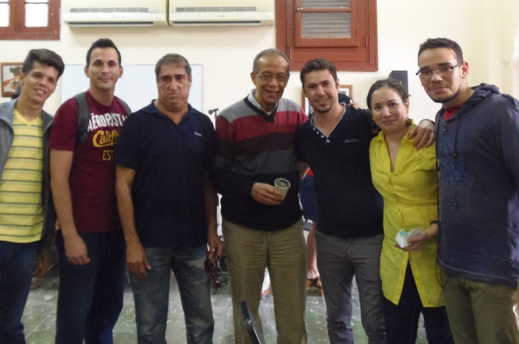 Eduardo